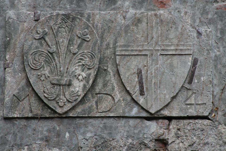 Rocca di Ripafratta (PI) - stemmi fiorentini all'ingresso: giglio di Firenze e croce del popolo